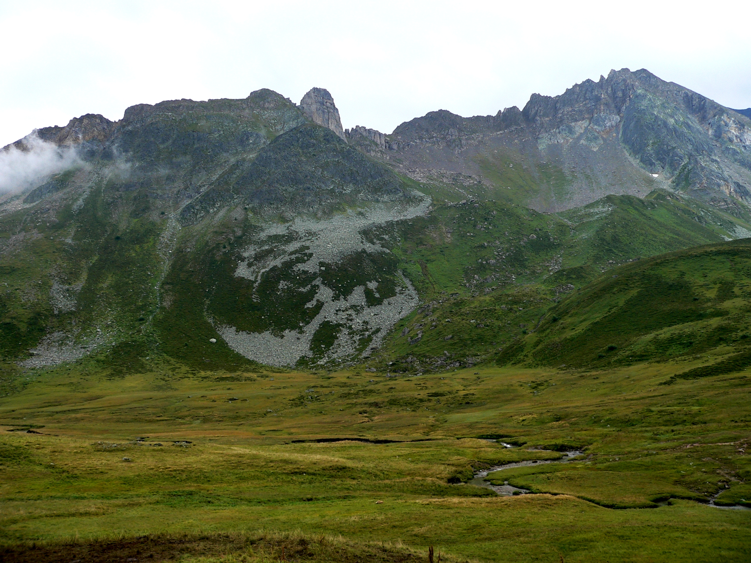 Cormet de Roselend, french Alpes